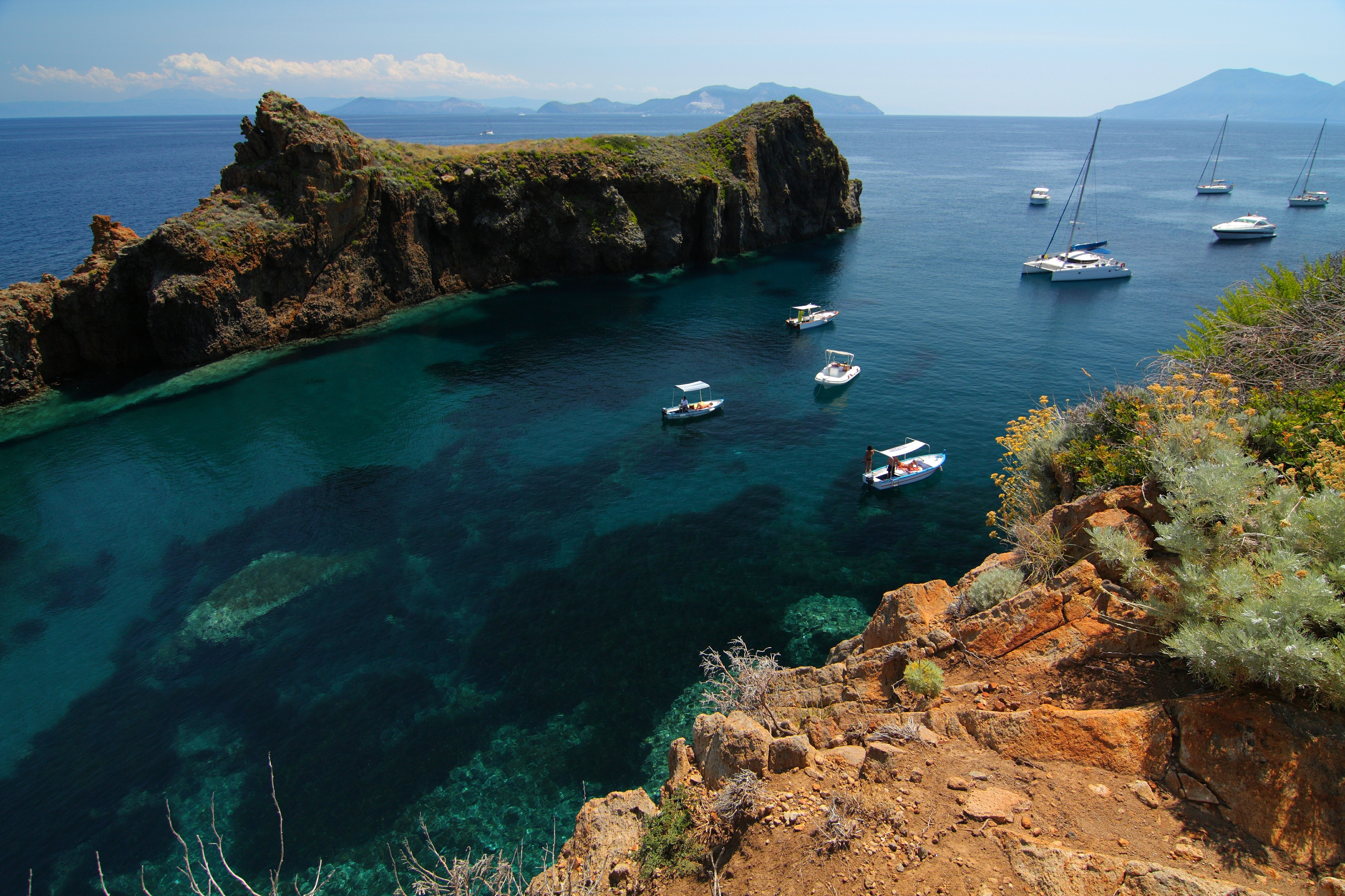 Punta milazzese, Cala Junco